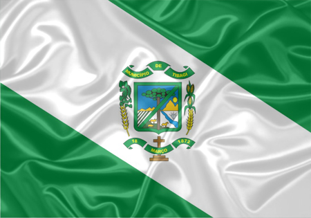 Bandeira do Município de Tibagi, PR.